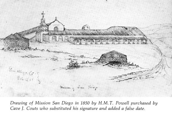 Mision de San Diego (José Pedro Panto)